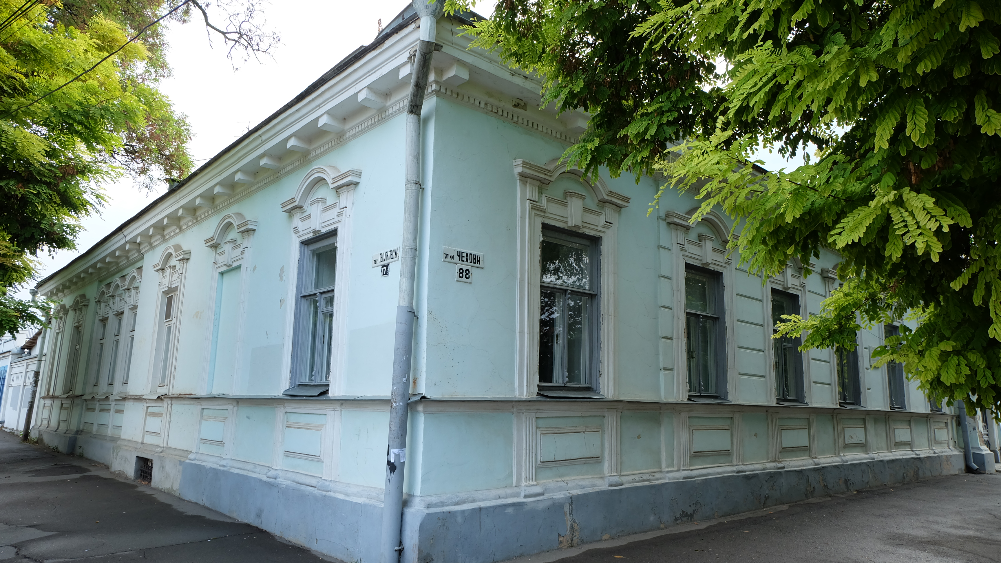 Дом, в котором жил писатель И.Д. Василенко: улица Чехова, 88, Таганрог, Ростовская область